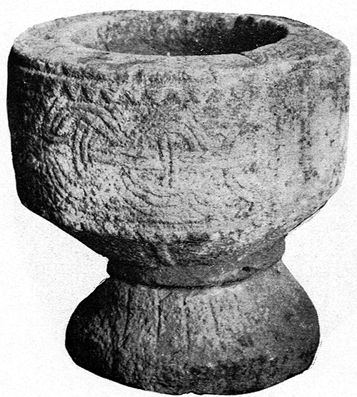 Fritsla kyrka. Dopfunt